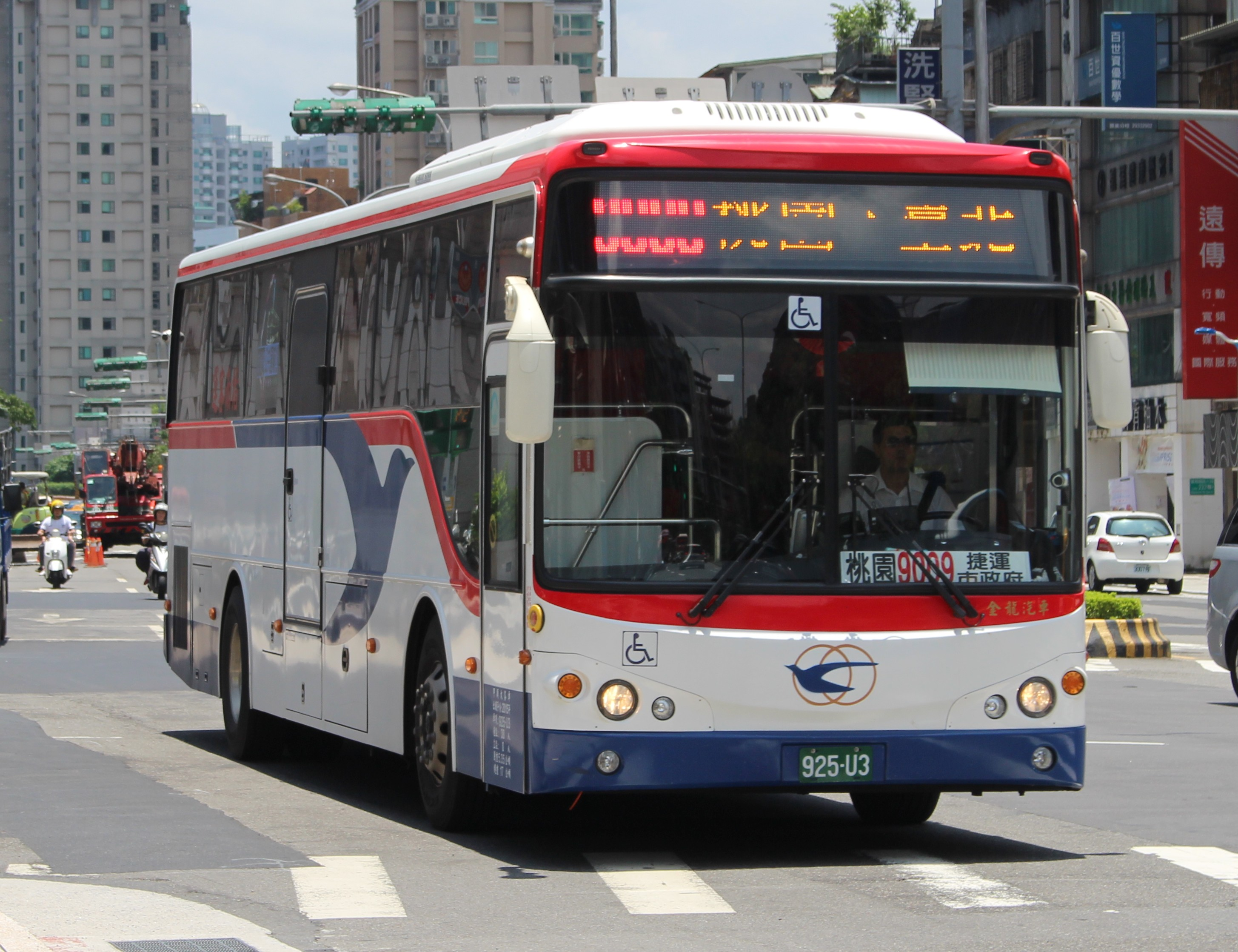 指南客運9009大型復康巴士925-U3 9009，中間門僅提供輪椅乘客使用，配有升降設備